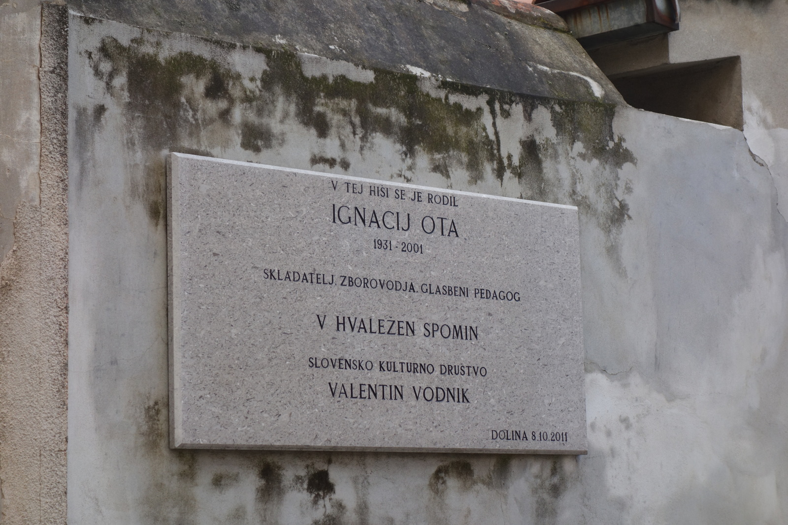 Rojstna hiša skladatelja Ignacija Ote v Dolini pri Trstu